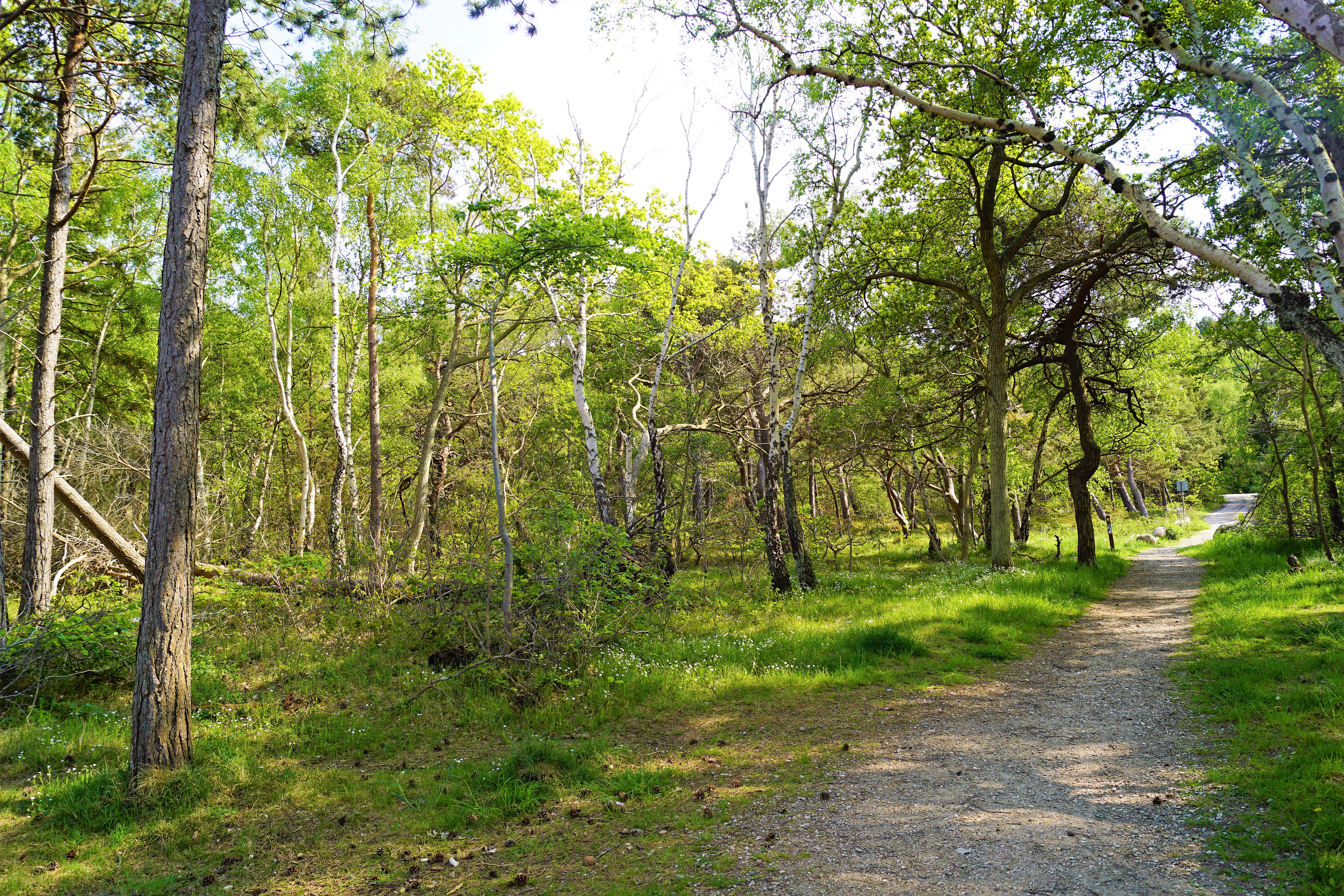 Sti i Hornbæk Plantage set mod vest